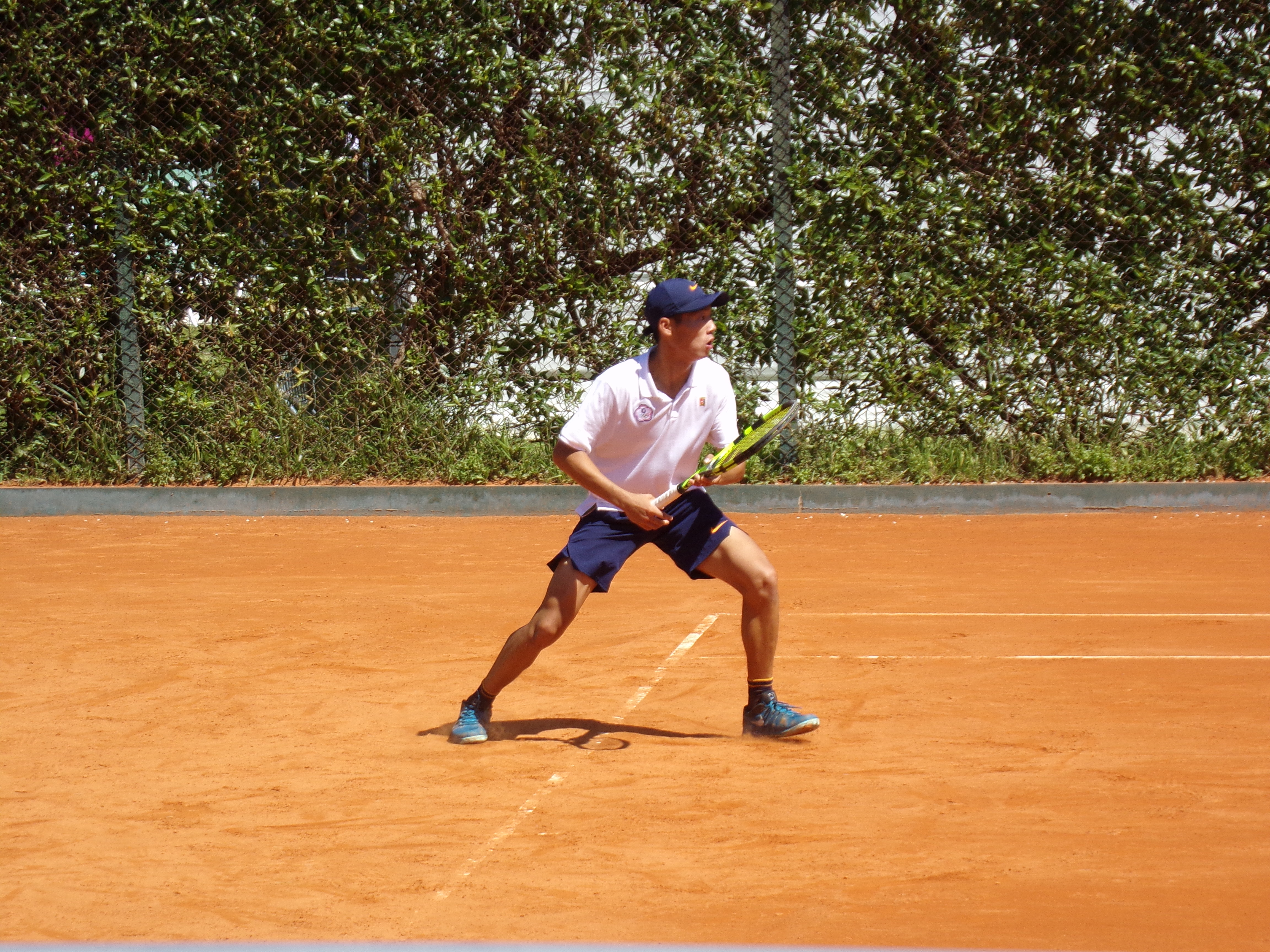 Tseng Chun Hsin in YOG Buenos Aires 2018